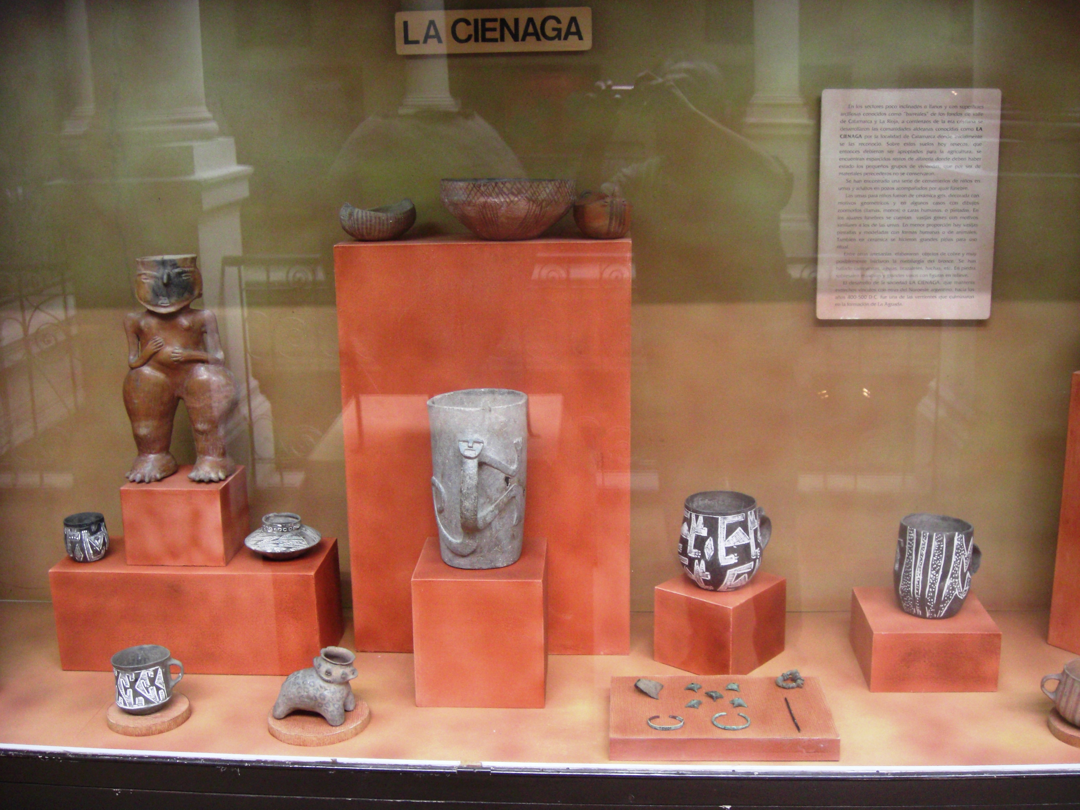 la infografia de la vitrina dice en forma resumida: "En los sectores poco inclinados o llanos y con superficies arcillosas conocidos como “barreales” de los valles de Catamarca y La Rioja a comienzos de la era cristiana, se desarrollaron las comunidades aldeanas conocidas como LA CIENAGA por la localidad catamarqueña donde inicialmente se las reconoció. Sobre estos suelos, hoy resecos y que entonces debieron ser apropiados para la agricultura, se encuentran esparcidos restos de alfarería donde debe haber estado los pequeños grupos de viviendas que por ser de materiales perecederos no se conservaron. El desarrollo de la sociedad La Cienaga que mantenía estrechos vínculos con otras del actual noroeste argentino hacia los años 400-500 d.c. fue una de las vertientes que culminaron en la cultura La Aguada."